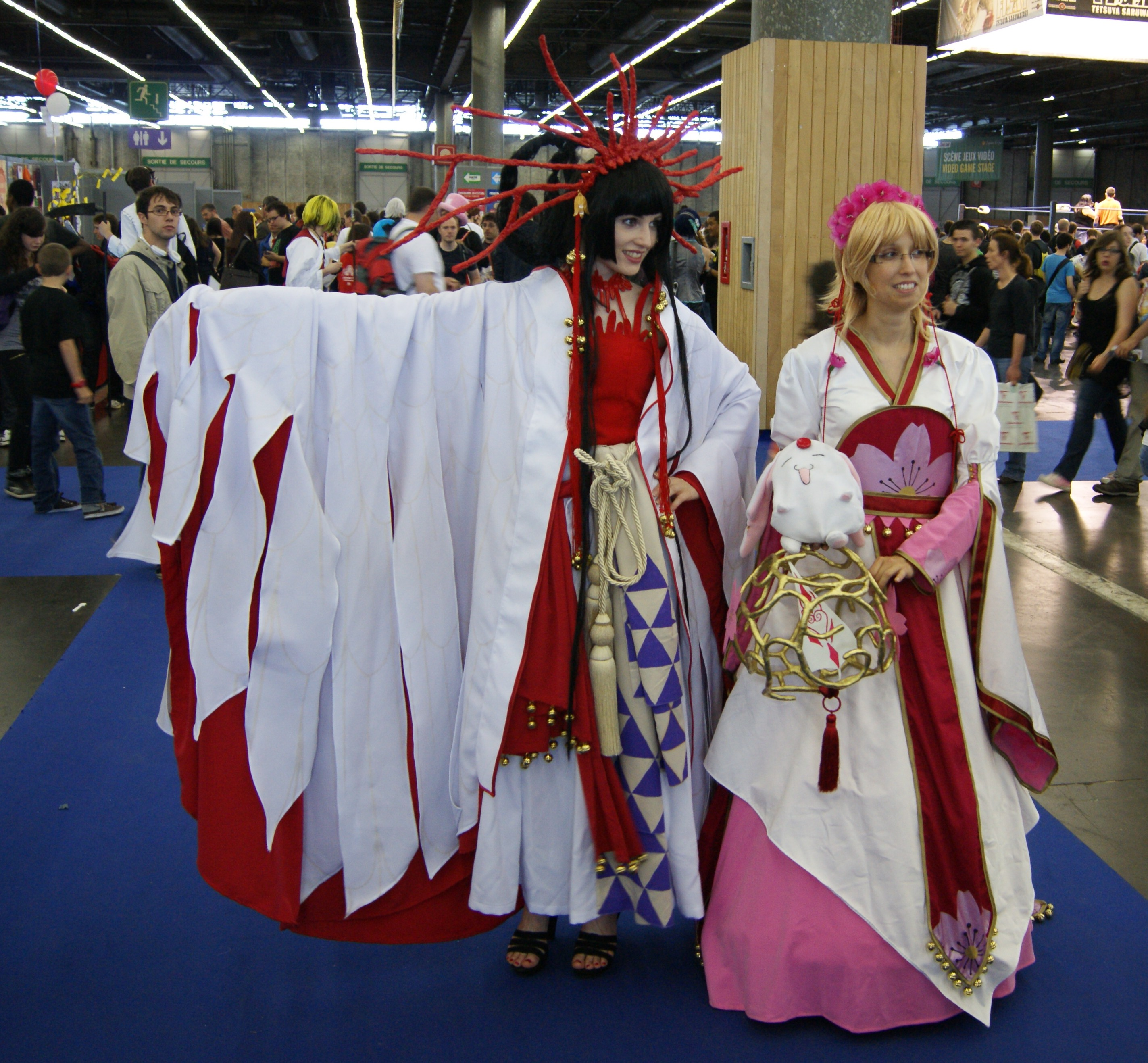 Cosplay - À gauche Yūko Ichihara, la petite bestiole Mokona, à droite, probablement Sakura Kinomoto, dans les mangas xxxHOLiC et Tsubasa -RESERVoir CHRoNiCLE- - Japan Expo 2012